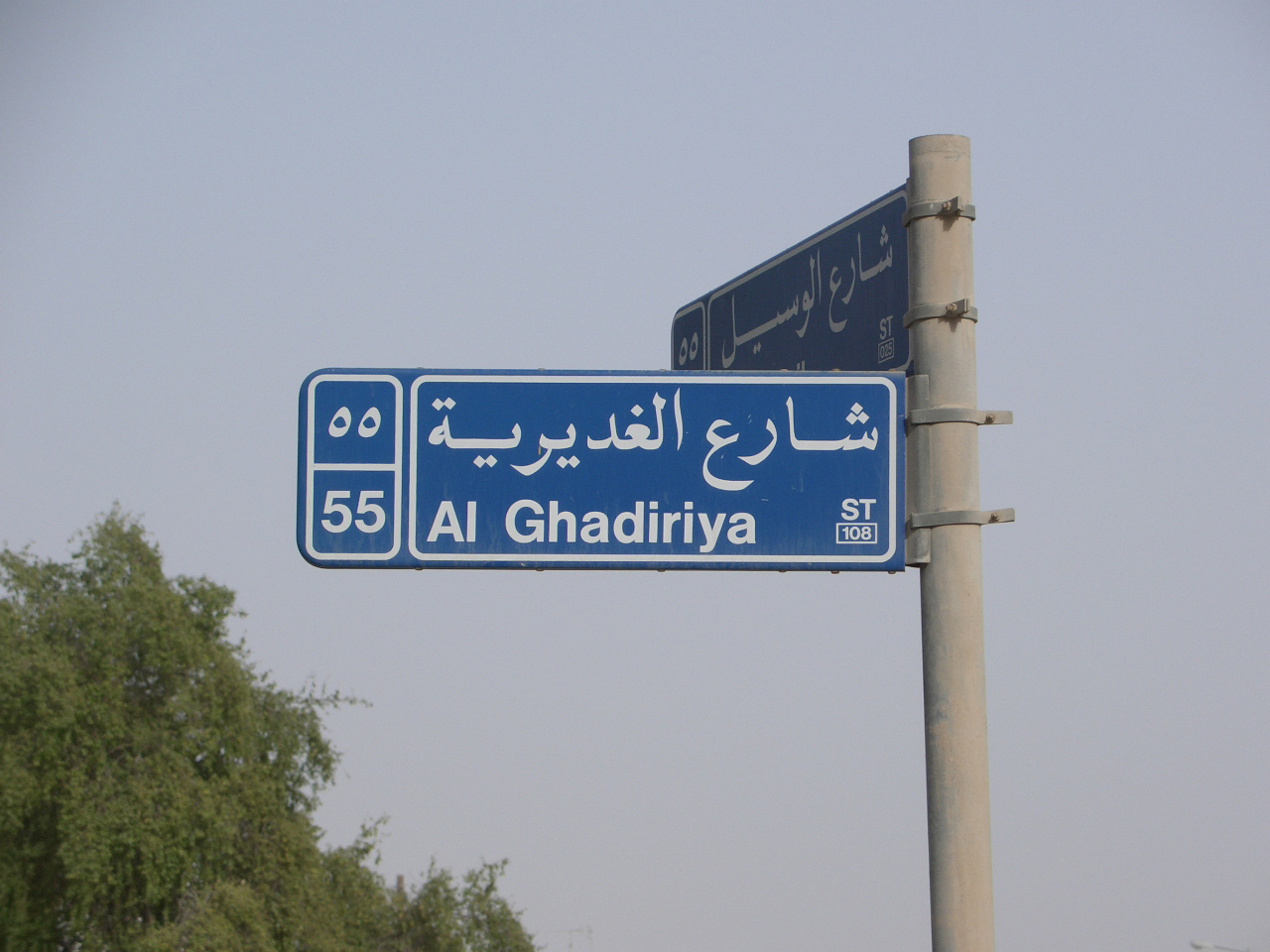 Señal de tráfico bilingüe en Doha (Qatar). Imagen tomada de flickr, el autor es currybet. Licencia Creative Commons Reconocimiento-CompartirIgual 2.0.